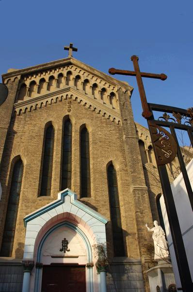 中国 河南开封 耶稣圣心主教座堂